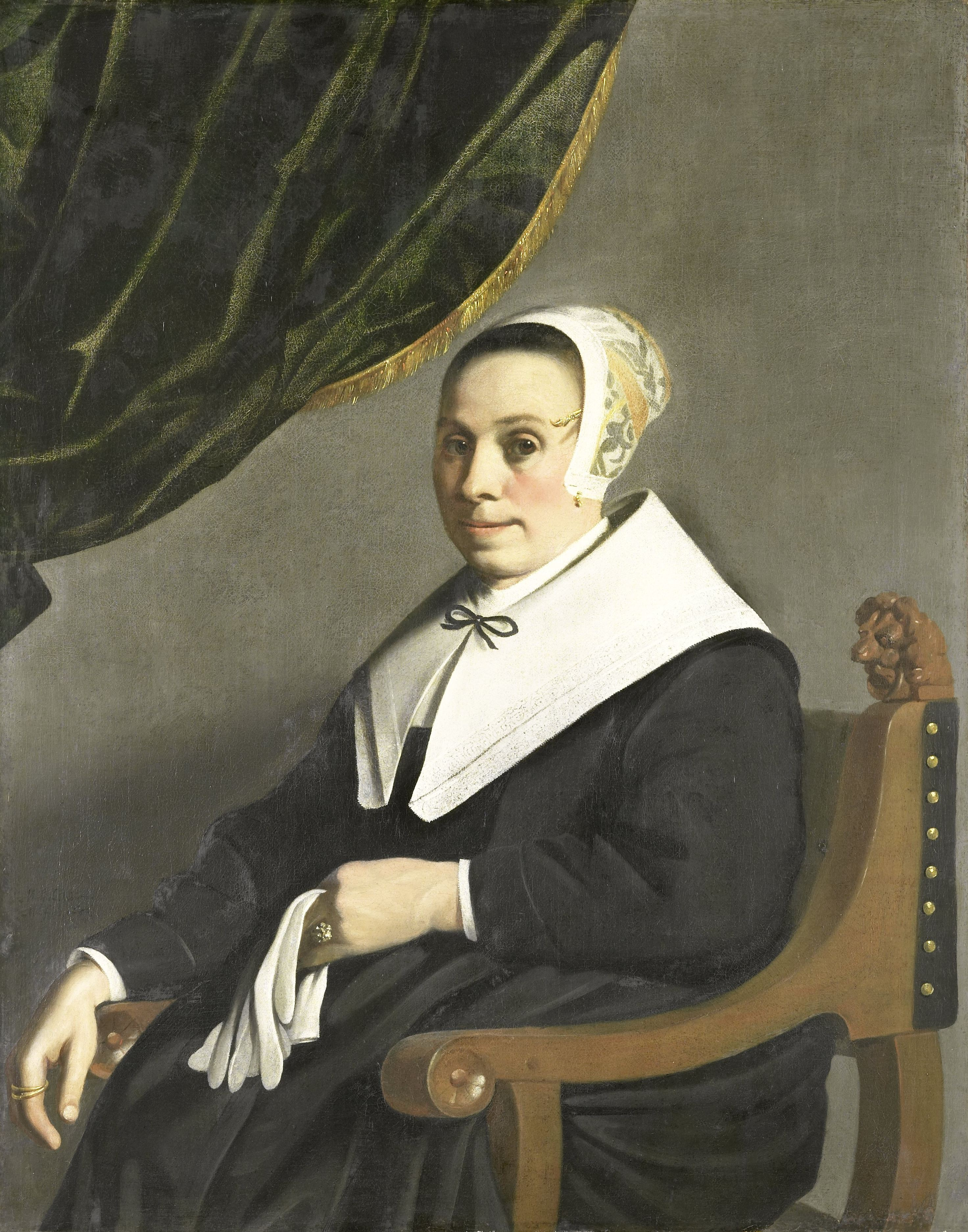 Portret van een vrouw. Kniestuk, zittende in een stoel, naar links, de handschoenen in de linkerhand.